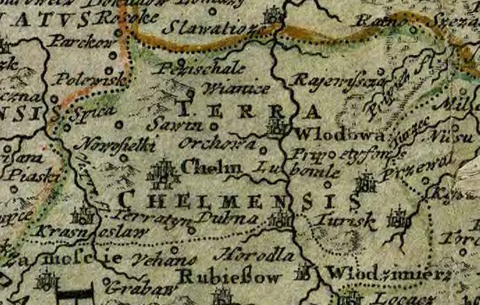 Ziemia chełmska na mapie "Regni Poloniae Magnique Ducatus Lithuaniæ : nova et exacta tabula ad mentem Starovolcii descripta" (J. B. Homann), 1739